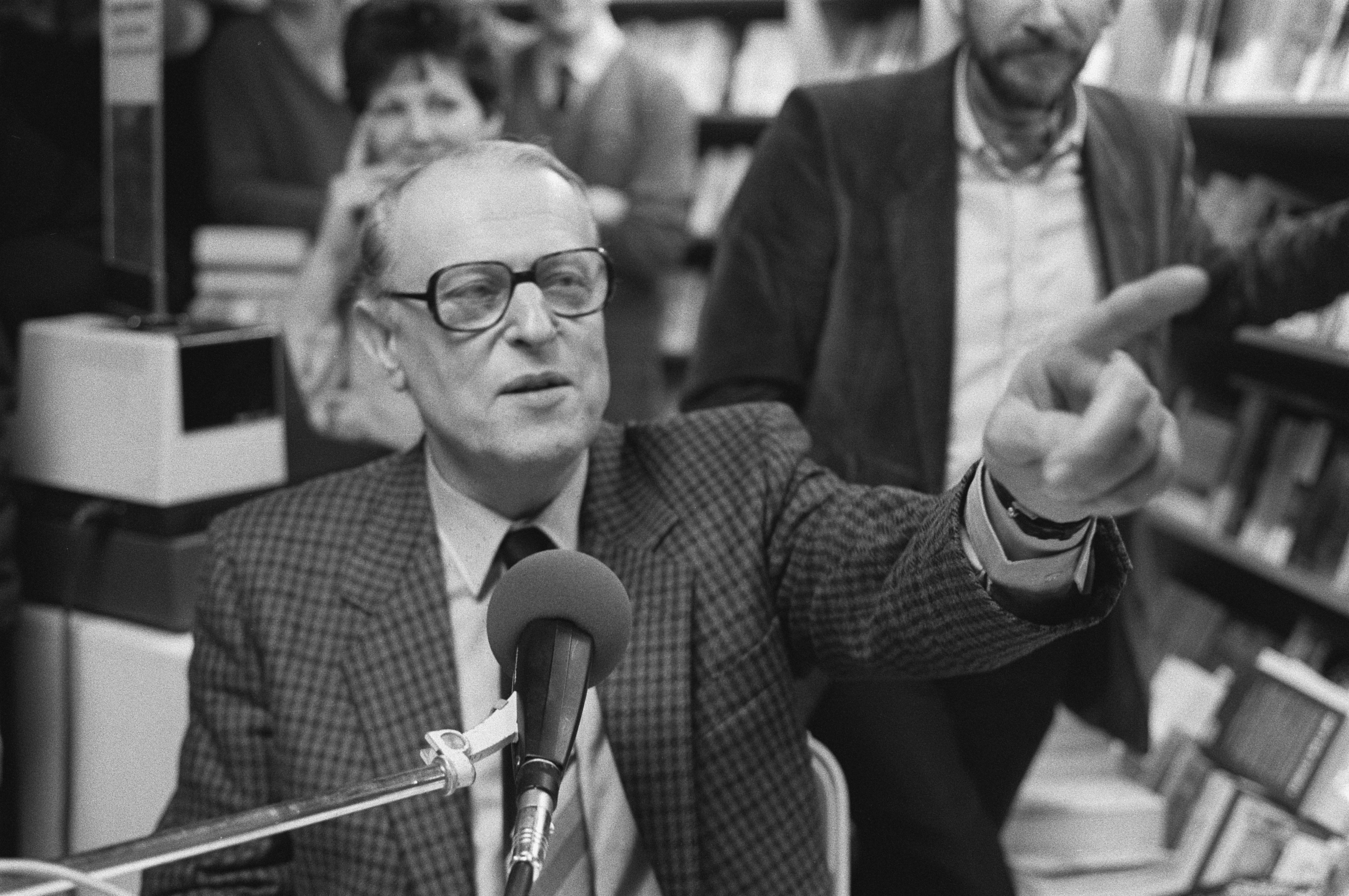 Collectie / Archief : Fotocollectie Anefo Reportage / Serie : [ onbekend ] Beschrijving : Interview met W. F. Hermans in de Bijenkorf Datum : 22 maart 1985 Locatie : Amsterdam, Noord-Holland Trefwoorden : boekenweken, interviews, portretten, schrijvers Persoonsnaam : Hermans W.F. Instellingsnaam : Bijenkorf Fotograaf : Croes, Rob C. / Anefo Auteursrechthebbende : Nationaal Archief Materiaalsoort : Negatief (zwart/wit) Nummer archiefinventaris : bekijk toegang 2.24.01.05 Bestanddeelnummer : 933-2733